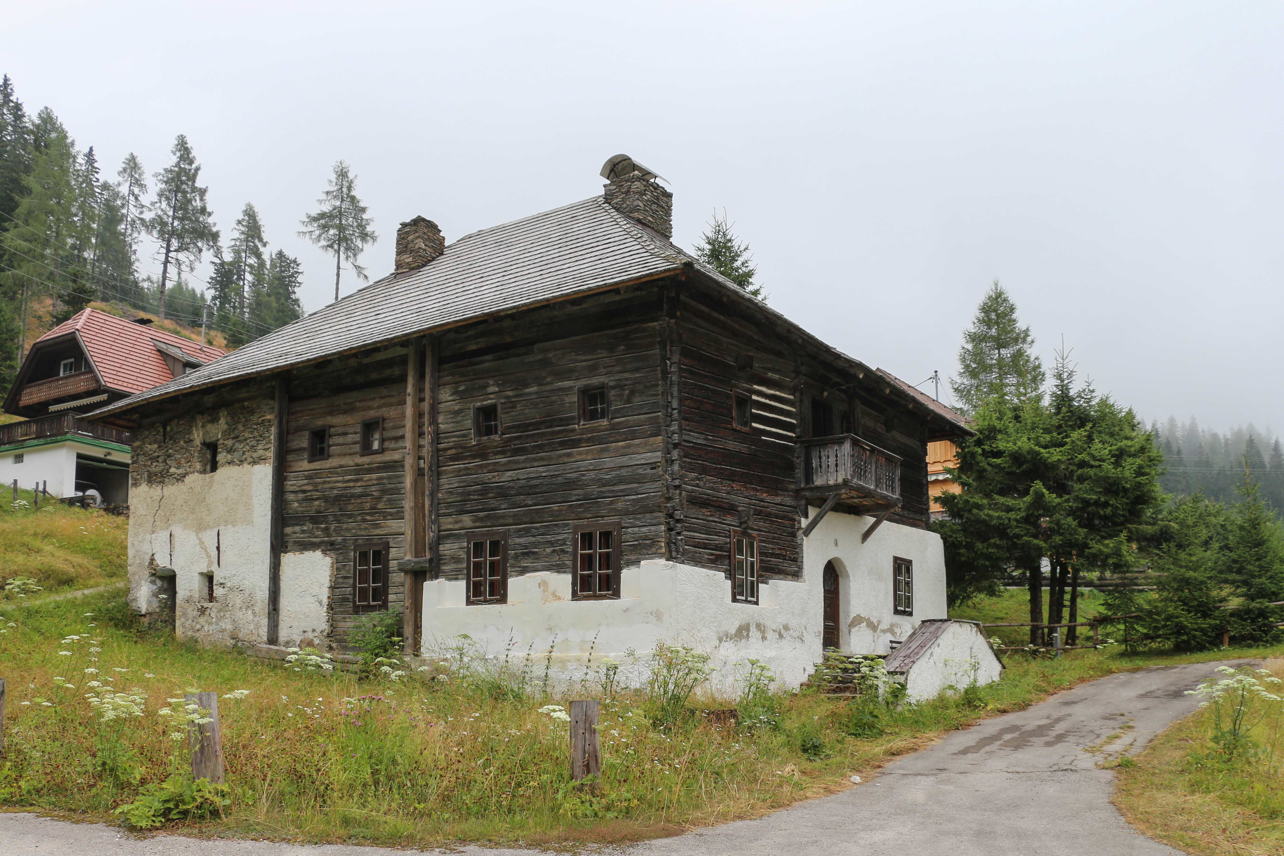 Amtsgebäude, Flattnitz 3, Gemeinde Glödnitz, Kärnten